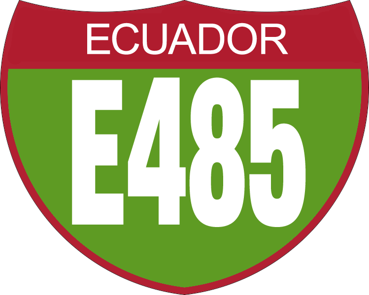 Disco de Identificación Ruta E485